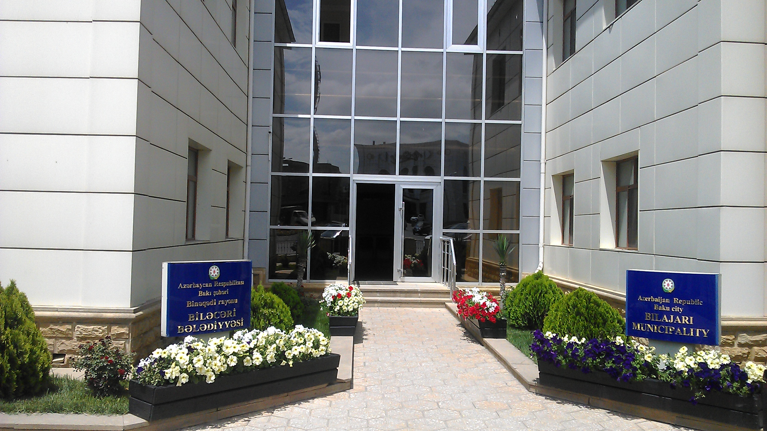 Biləcəri bələdiyyəsinin binasının giriş qapısı.